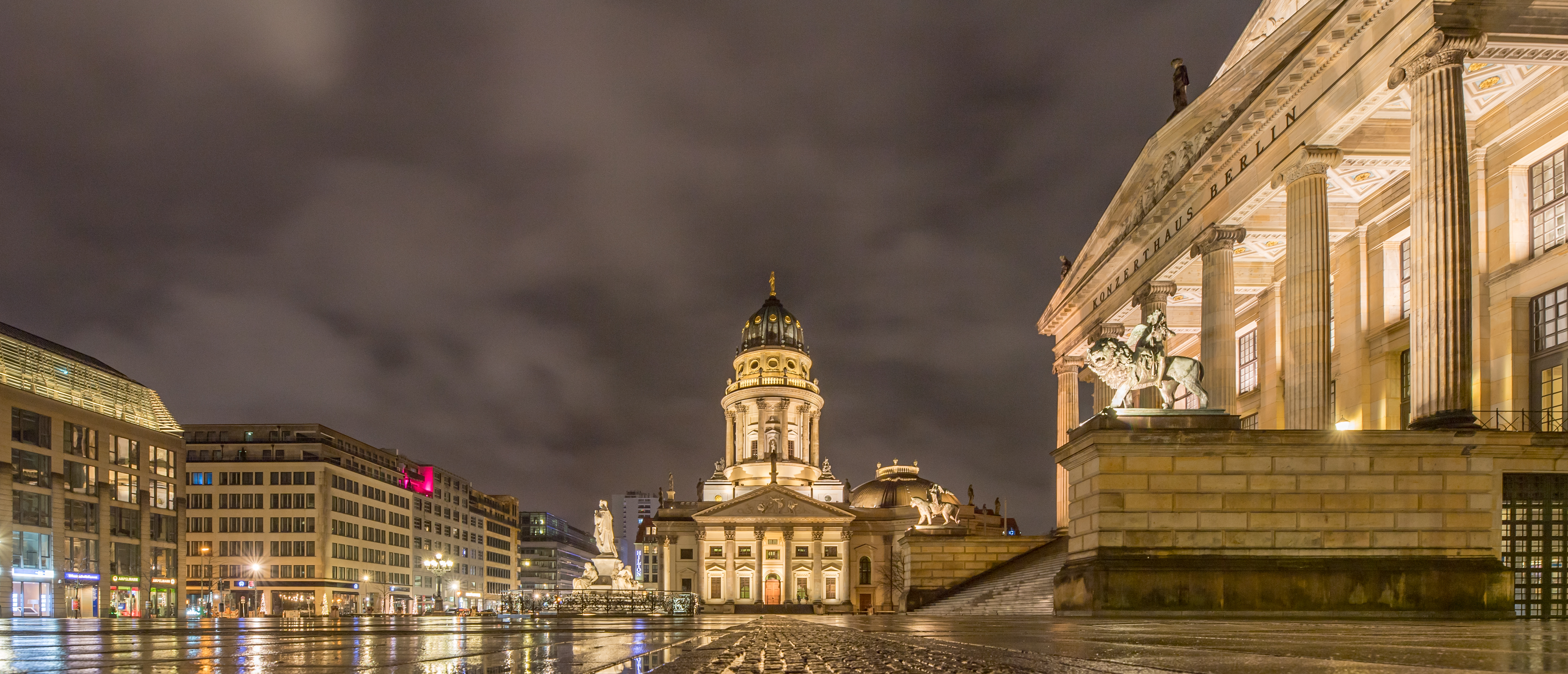 Berlin, 12.01.2019: Gendarmenmarkt